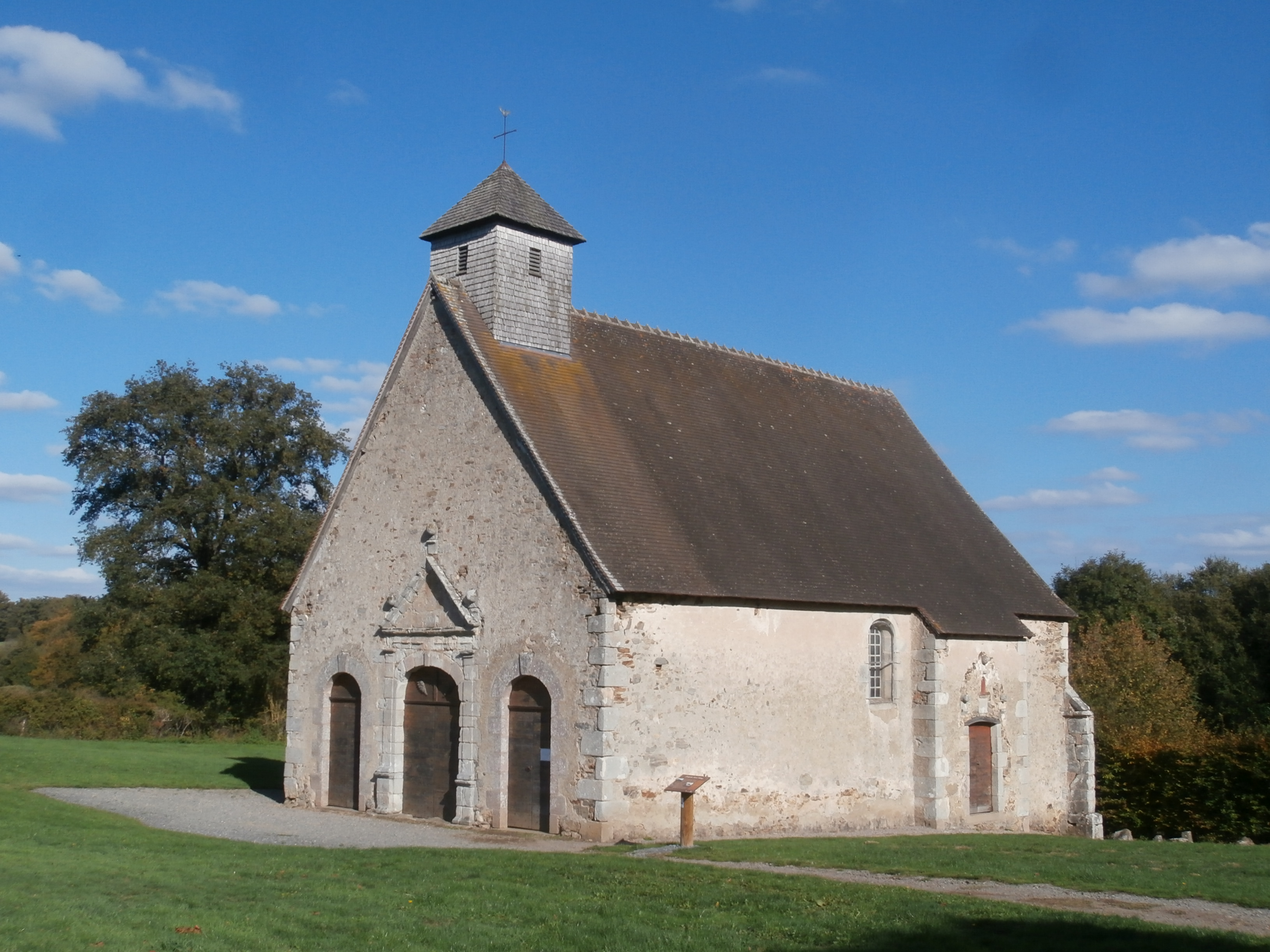 Chapelle Saint-Rémy du XVIIe siècle (Commune de Saint-Sauvier dans le département de l'Allier)